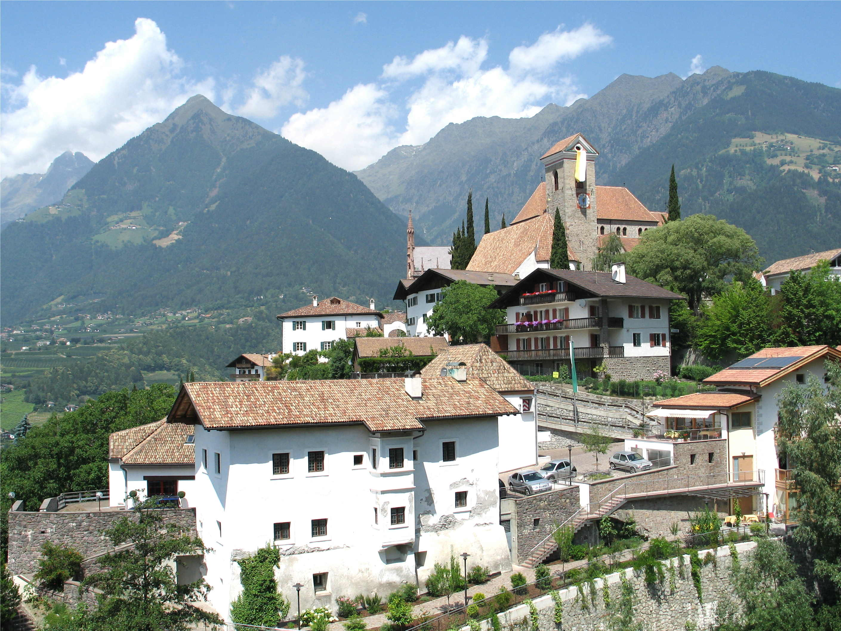 Vue op Schenna